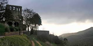 Monastegirako bidea